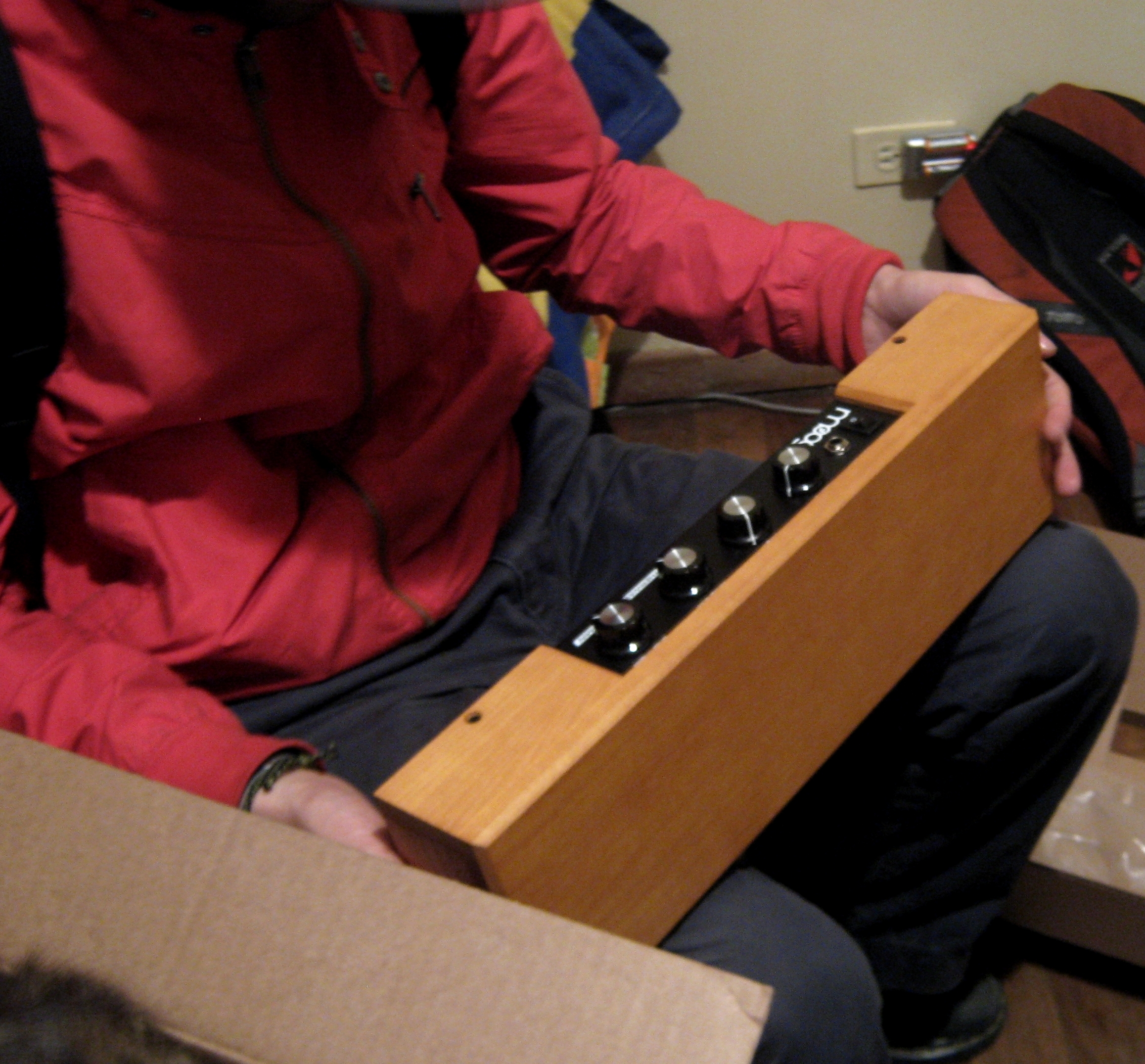 theremin en las manos